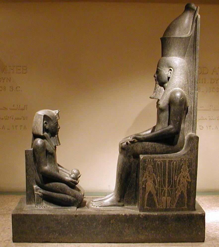 Antiquité égyptienne, Horemheb devant le dieu Atoum, Musée de Louxor, Louxor, Égypte.